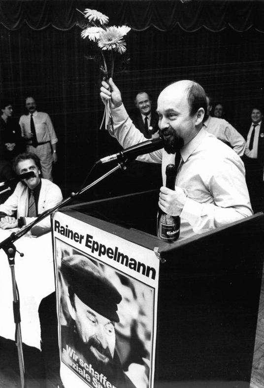 ADN-Pätzold-Schwerin: Sonderparteitag des DA - Auf dem Sonderparteitag des DA wurde Rainer Eppelmann als Parteivorsitzender bestätigt. 162 Delegierte votierten für und zwei gegen Eppelmann, der den Demokratischen Aufbruch in der neuen DDR-Regierung als Minister für Abrüstung und Verteidigung vertritt.